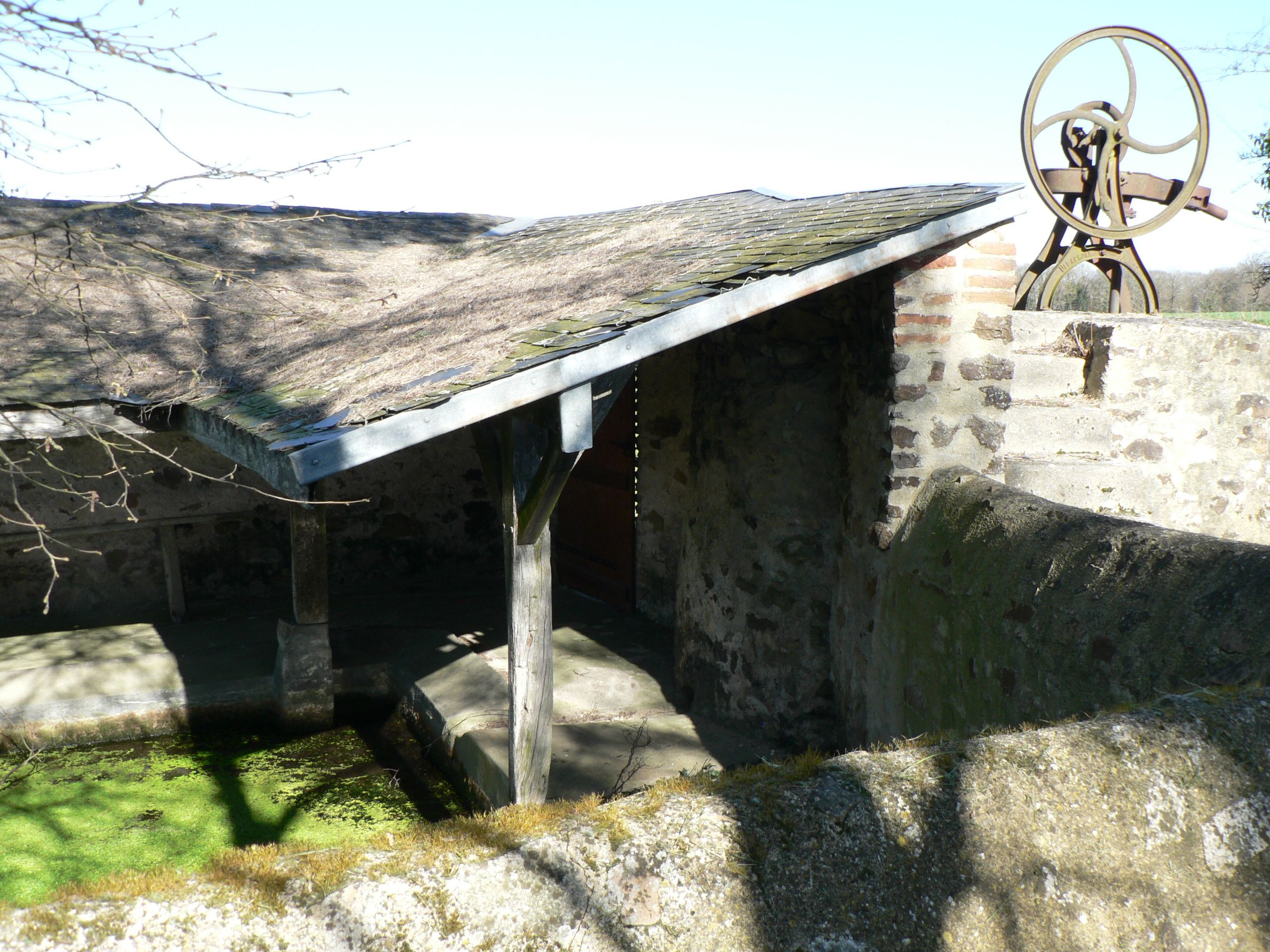 Lavoir sur retenue de Biard à Glenay (79)